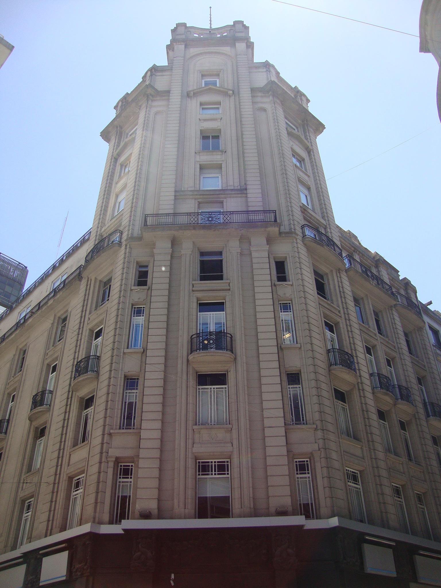 "Edificio Británico", antigua sede de la Royal Mail Steam Packet Company y de la Embajada del Reino Unido. Luego casa central del Banco Federal Argentino, y hoy sede del Banco Macro.